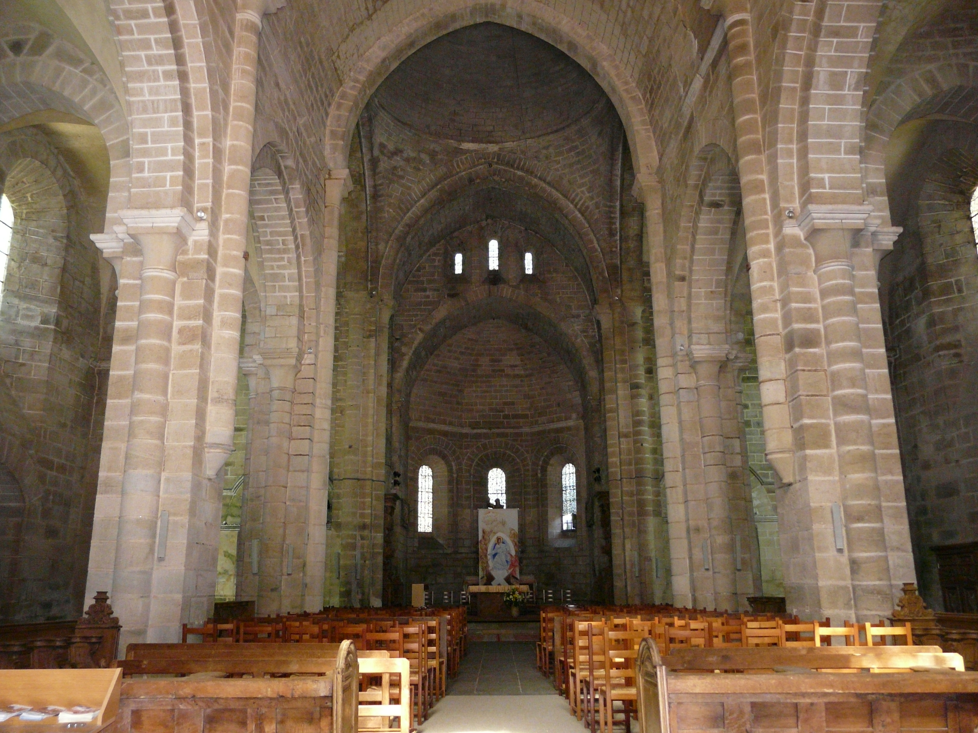 La nef de l'église abbatiale d'Aubazine, Corrèze, France